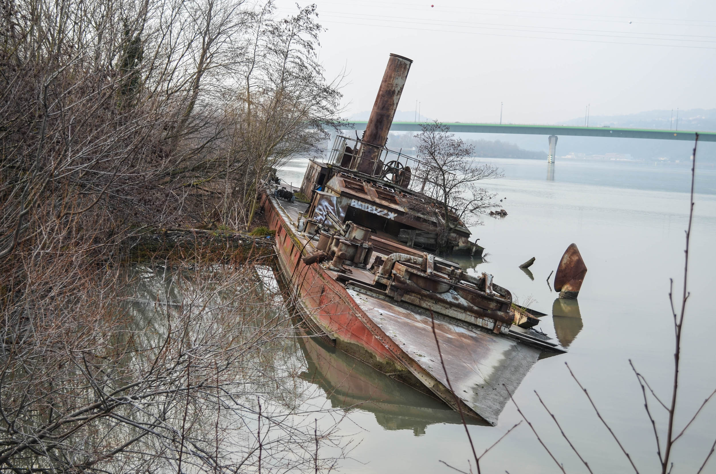 Épave du toueur Ardèche, construit en 1896, port de l'Épervière à Valence, Drôme.